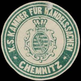 Sealing stamp Title: K.S. Kammer für Handelssachen Chemnitz Description: grün, weiß Place: Chemnitz size: 3 cm